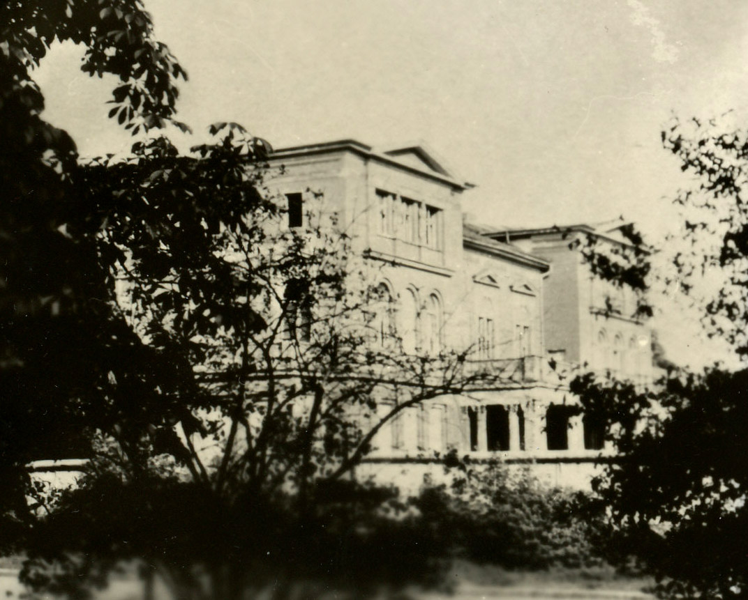 Klein-Glienicke, Restauration 1973 (1974 abgerissen)